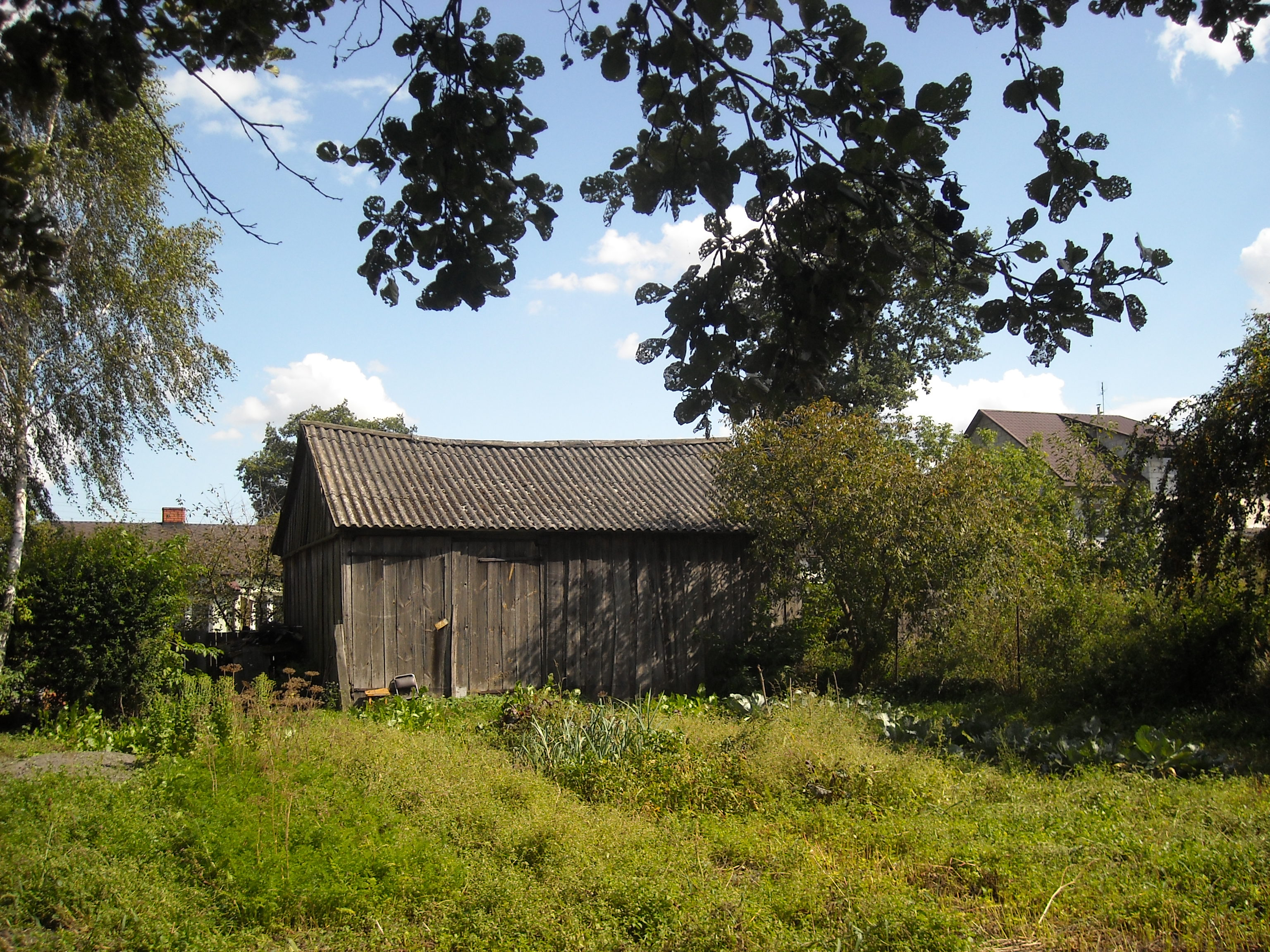 Pozostałości po wsi Wrotków nieopodal rzeki Bystrzycy i ul. Nałkowskich - takie zabudowania jak te to już w lubelskiej dzielnicy Wrotków widok unikatowy.